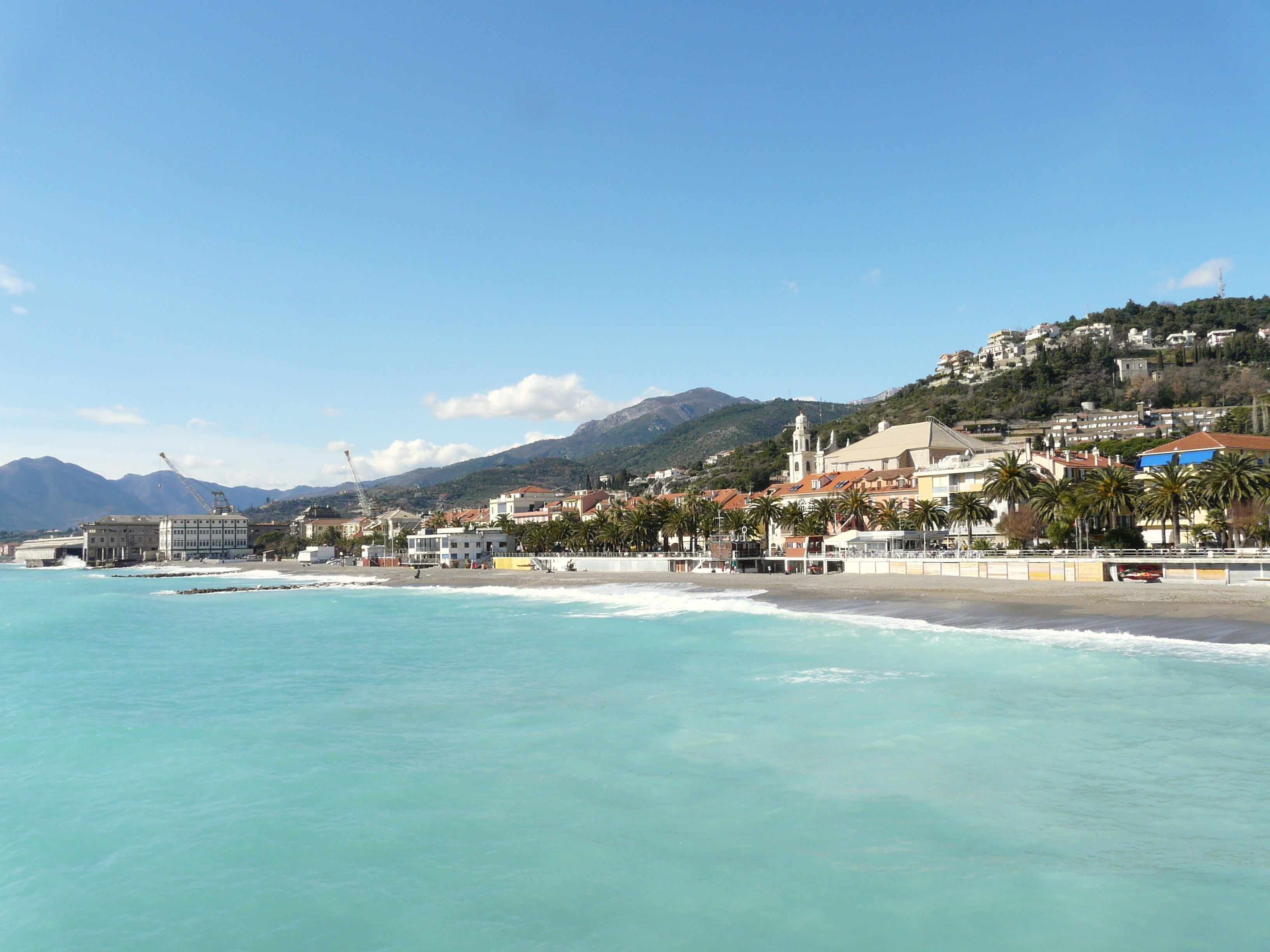 Pietra Ligure, Liguria, Italia